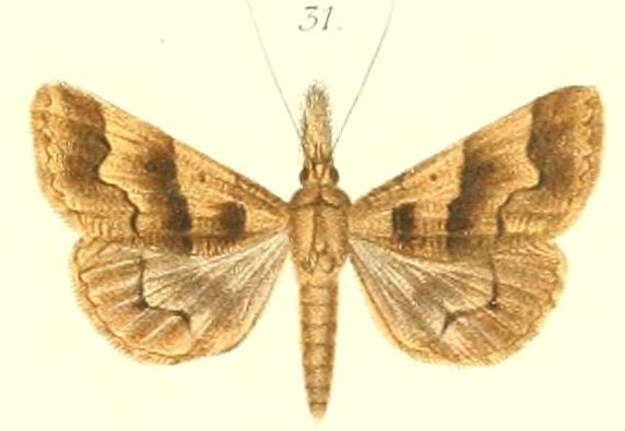 Ophyx crinipes (Felder & Rogenhofer 1874)